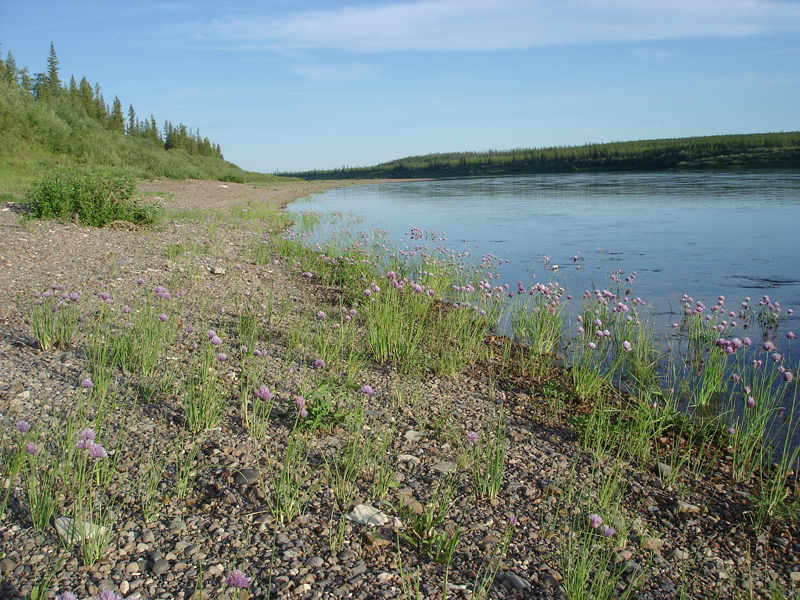 река Марха, левый приток реки Вилюй